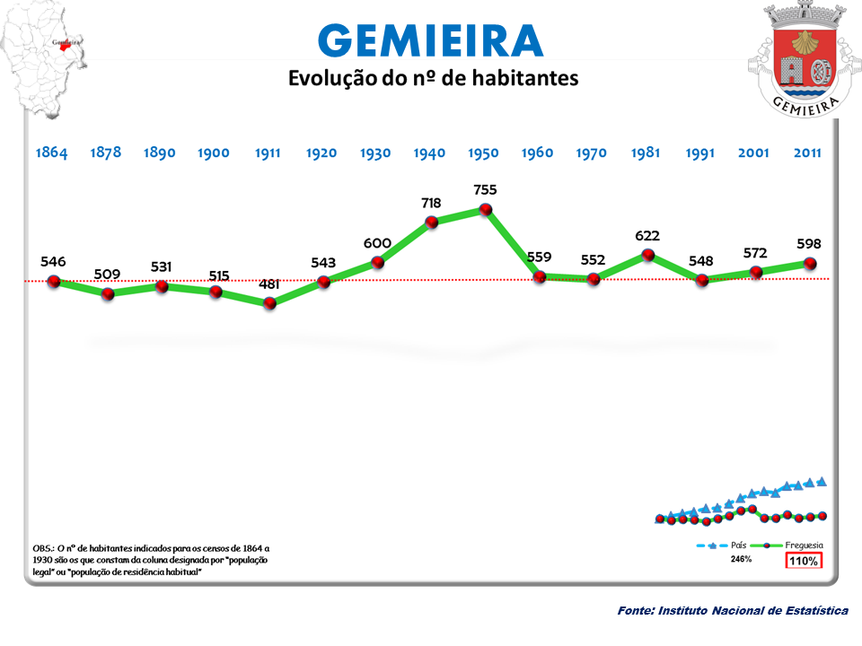 Cenos 1864/2011